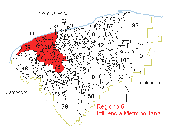 La bildo montras la situon de la regiono 6, Influencia Metropolitana en Yucatán. Kategorio:Geografio de Yucatán